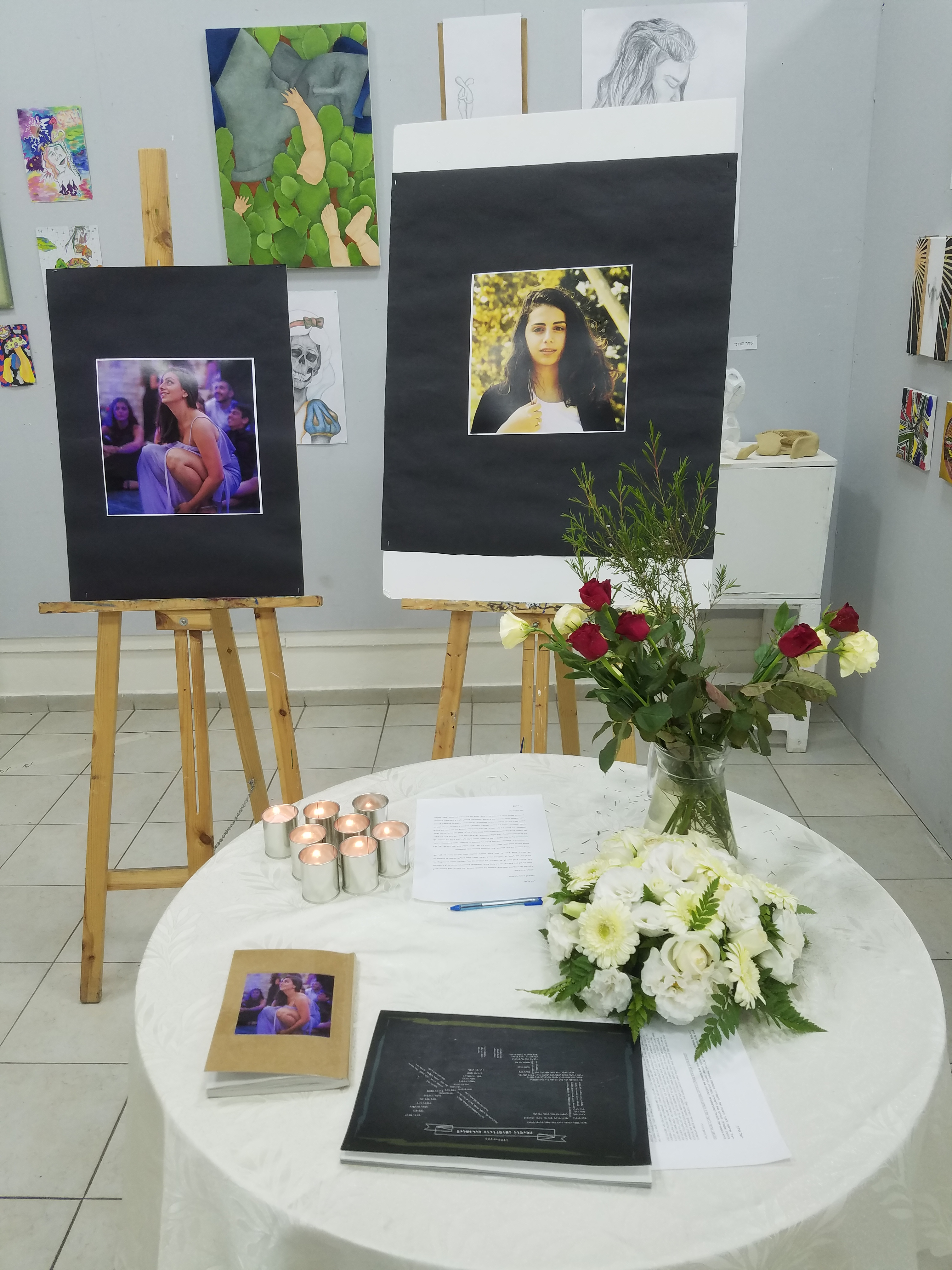 פינת הנצחה ליעל סדן, מנספות אסון נחל צפית, התיכון לאמנויות ע"ש צ'ארלס א' סמית' בירושלים